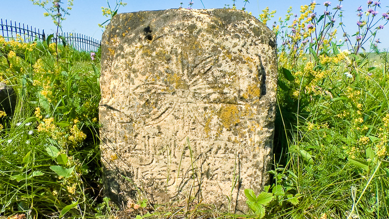 Изгеләр зиратындагы ташбилгеләрнең берсе